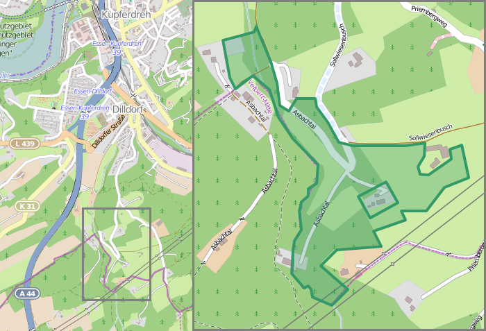 Naturschutzgebiet Asbachtal (E-012) – Karte